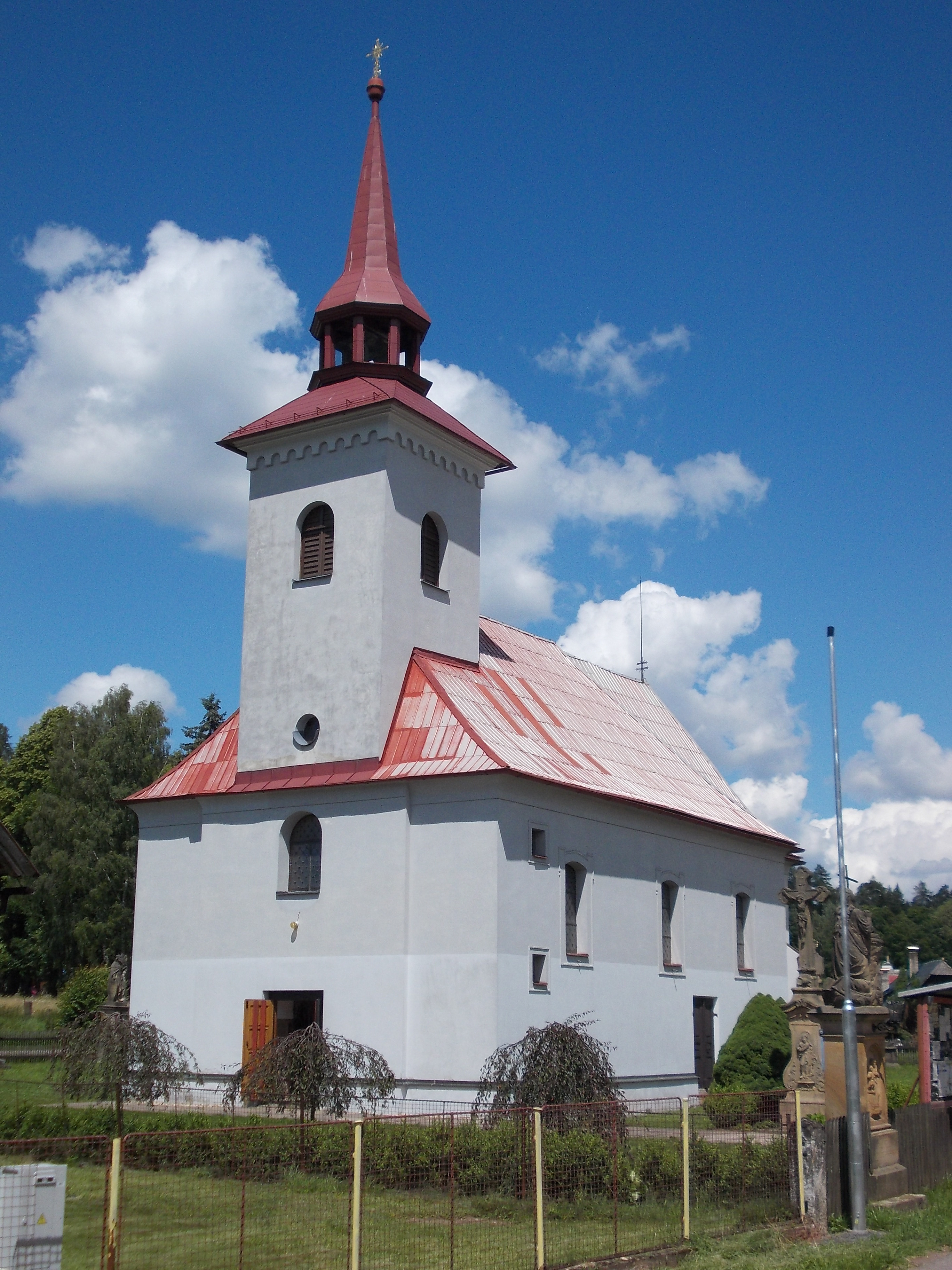 Levínská Olešnice - kostel Všech svatých